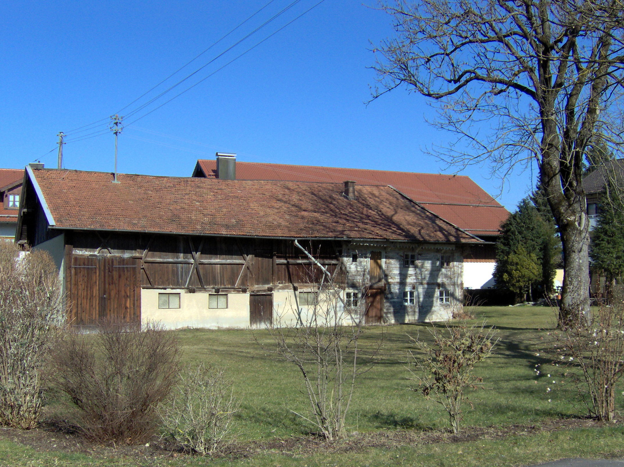 Standort: Unterhaching, Hauptstraße 85 Name: Beim Straßmaier Beschreibung: Bauernhaus, Einfirstanlage, Wohnteil als zweigeschossiger Blockbau, am Wirtschaftsteil Bundwerk, 2. Hälfte 18. Jh. (im Sommer 2010 abgebrochen) Denkmal-Nummer: D-1-84-148-6